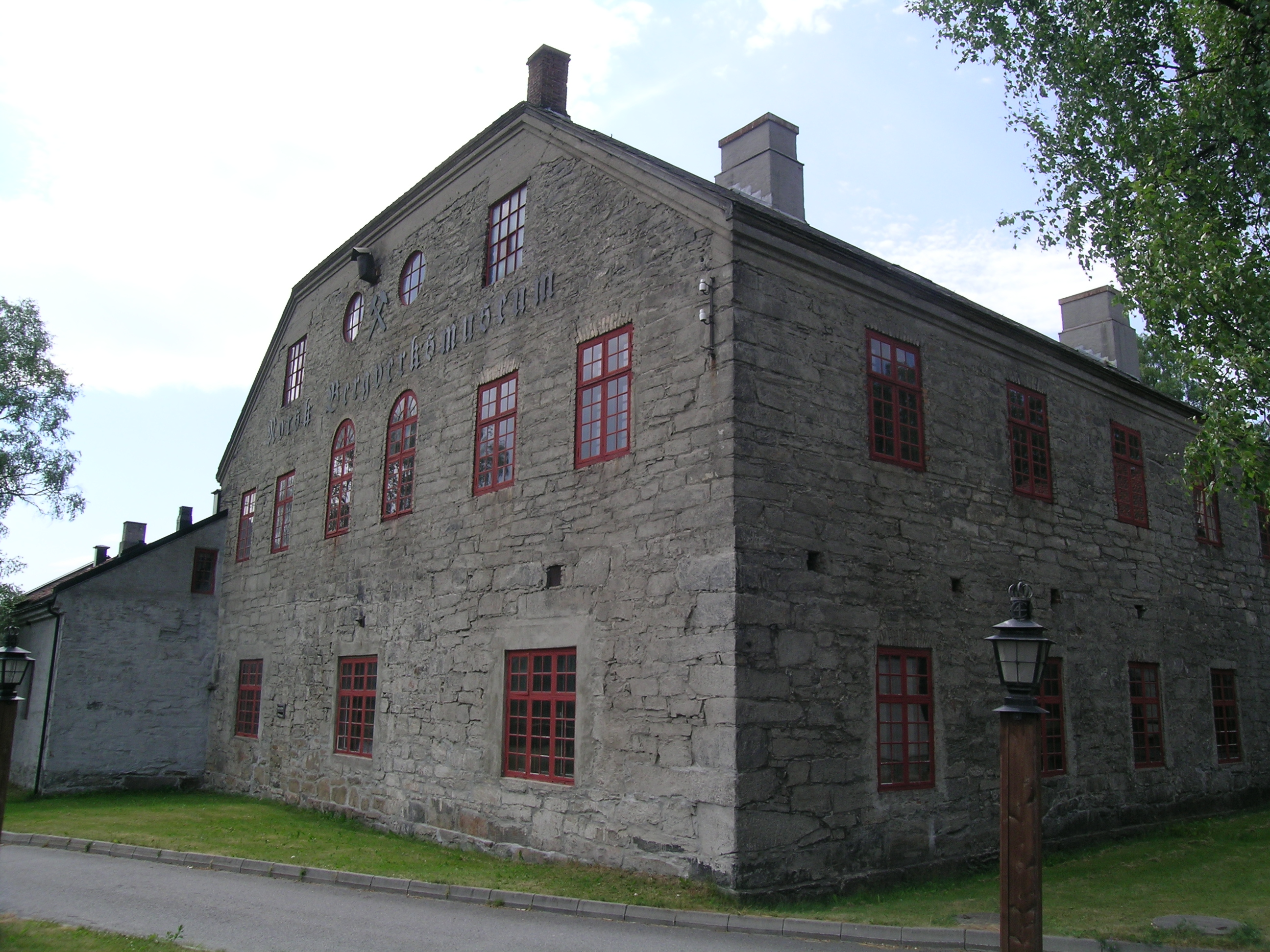 Norsk Bergverksmuseum (Norwegian Mining Museum), Kongsberg.